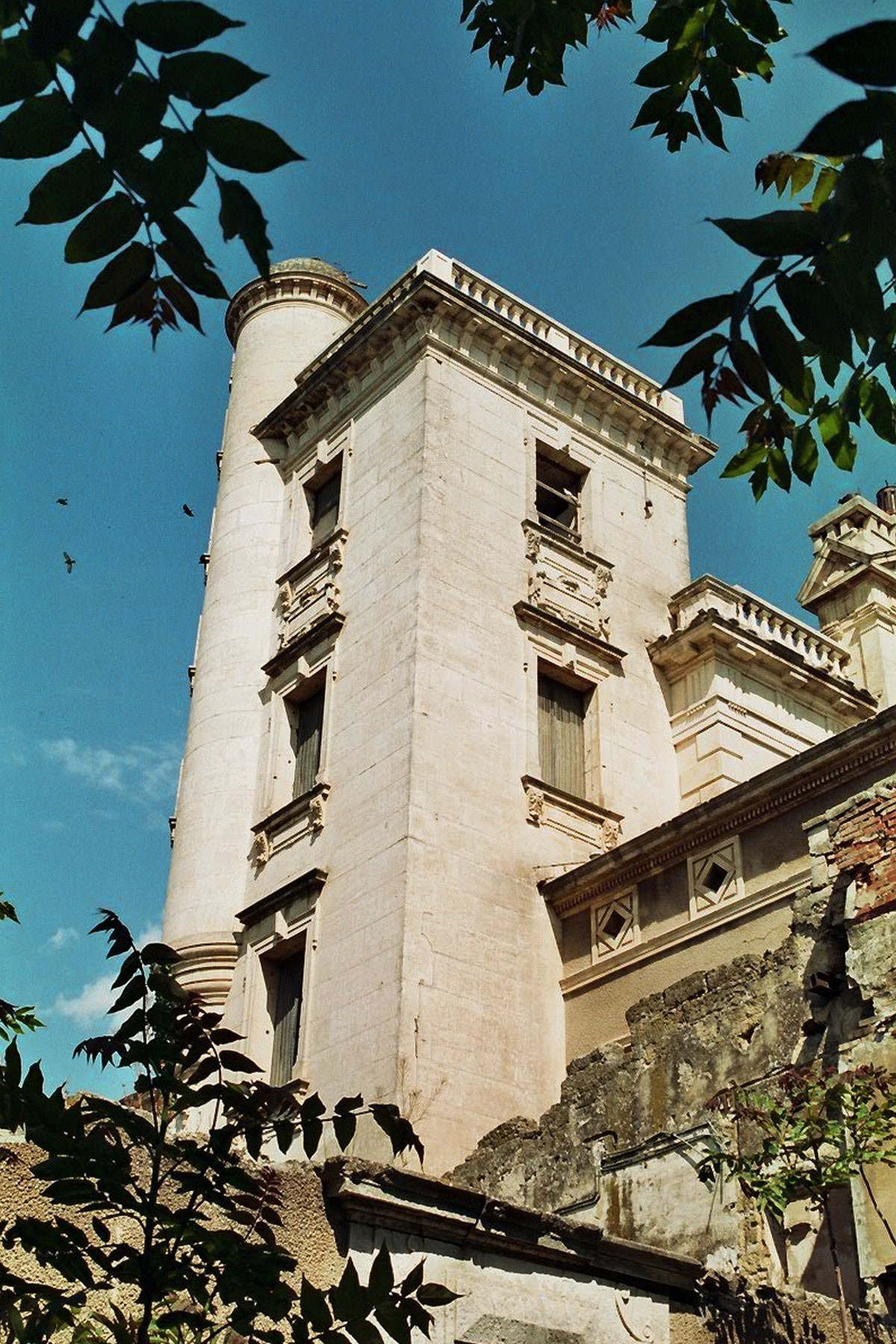 Château de "Montcalm Noilly Prat" édifié par l'industriel négociant marseillais Louis Prat dans les années 1880 à Montcalm , hameau de la commune de Vauvert (Gard) et abandonné aprés son décés en 1932 .